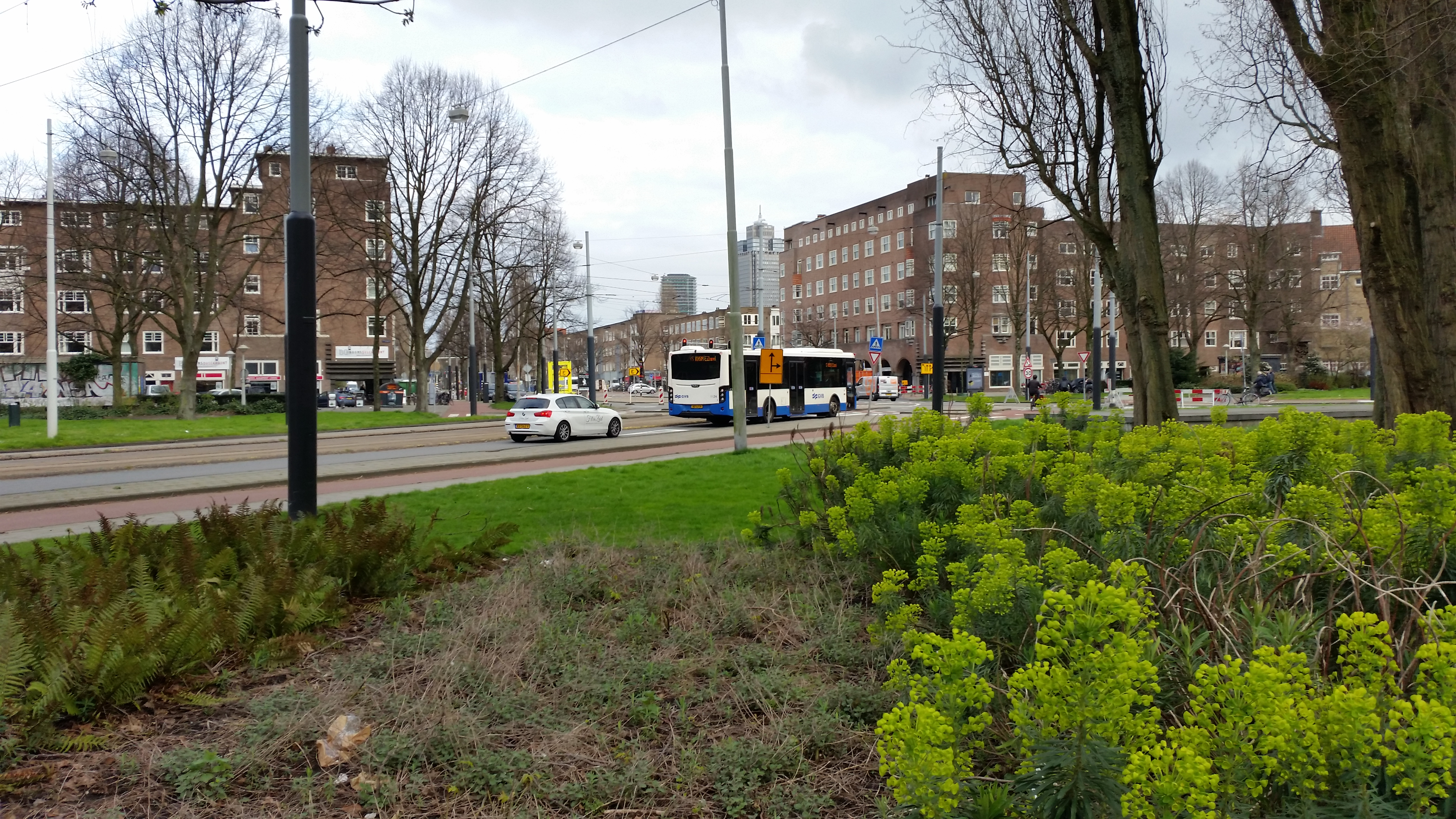 Overzicht over het Victorieplein vanuit de Churchill-laan